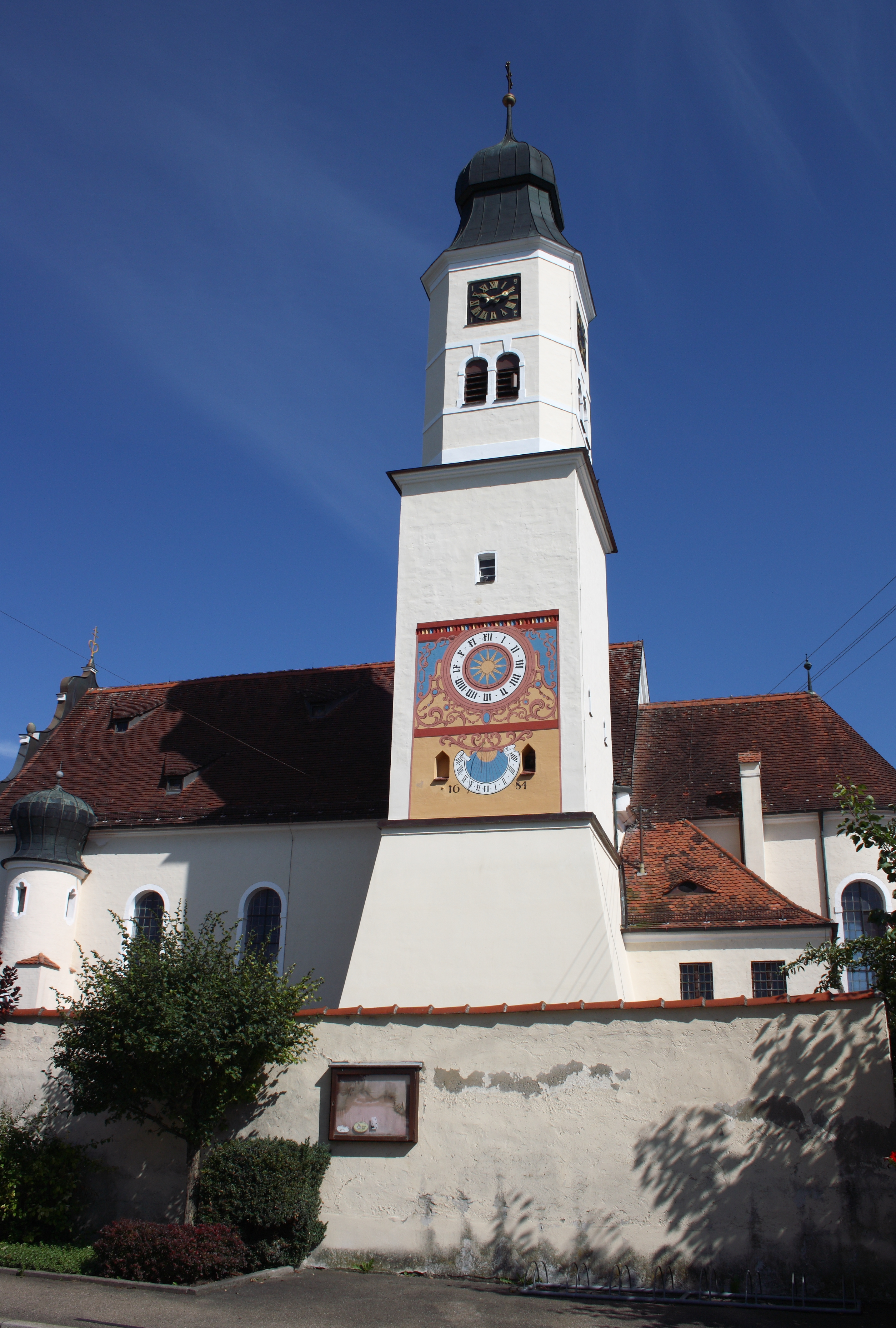 Katholische Pfarrkirche St. Blasius in Fristingen, einem Stadtteil von Dillingen an der Donau im Landkreis Dillingen an der Donau (Bayern), Turm aus dem 13. Jh., mit Sonnenuhr